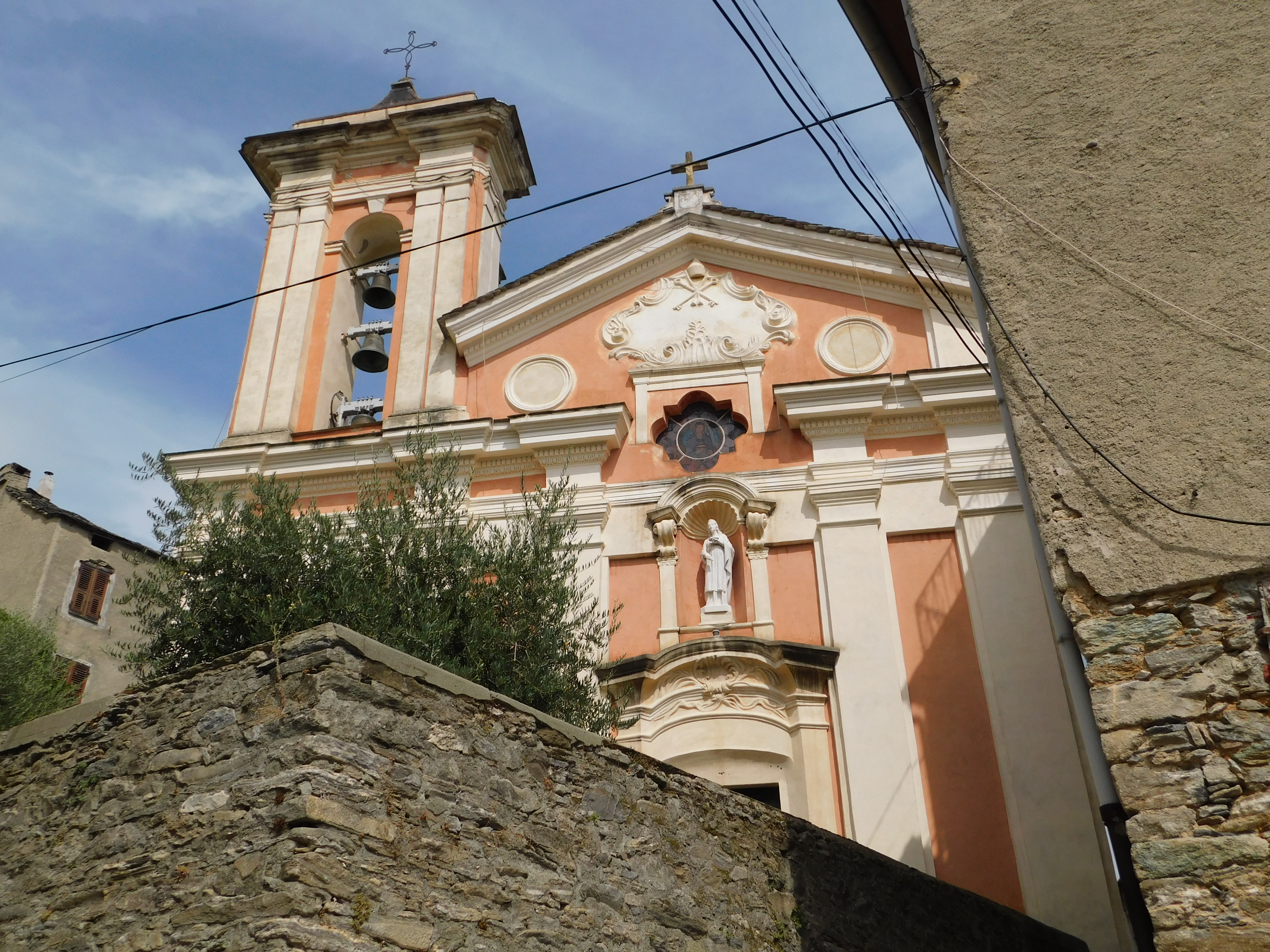 Église Sainte-Lucie de Talasani